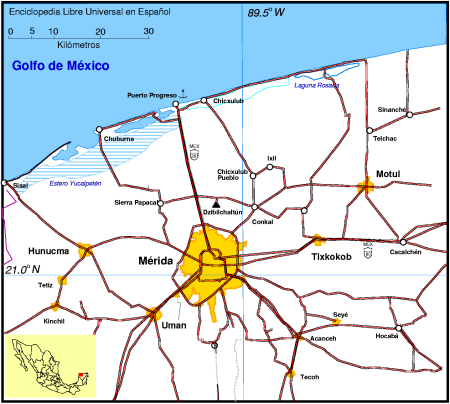 Mapa de localización de la Ciudad de Mérida